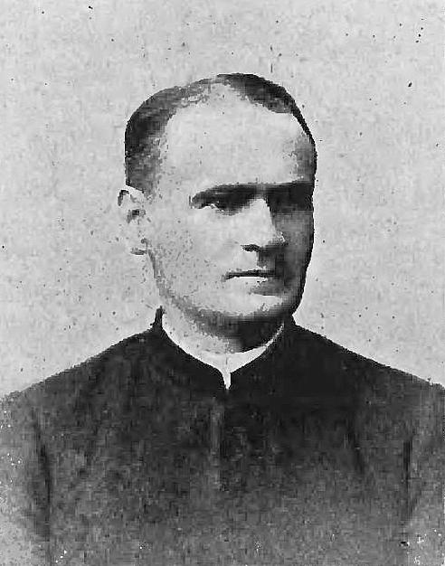 Tytus Wojnarowski (-1907)